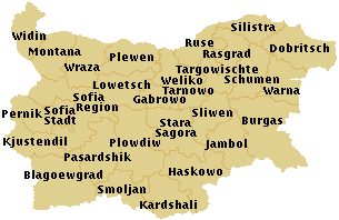 Verwaltungsbezirke in Bulgarien